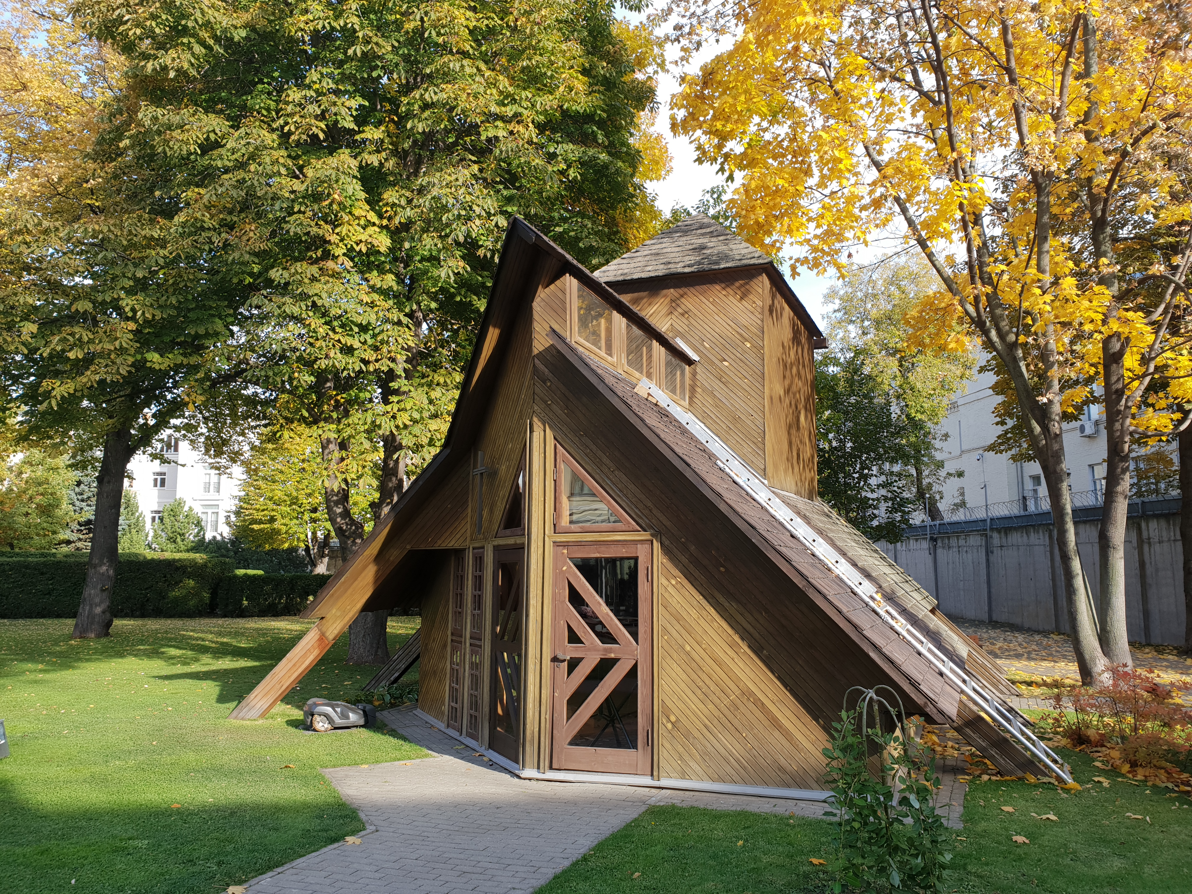 Latvijas vēstniecības Krievijā dievnams, Maskava (2018.gads)